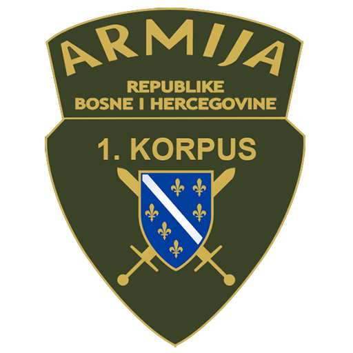 Prvi korpus armije republike Bosne i Hercegovine